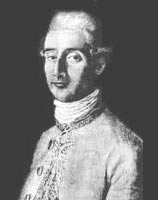 Retrato de Samaniego (Laguardia, Álava, 12 de octubre de 1745-íd, 11 de agosto de 1801)